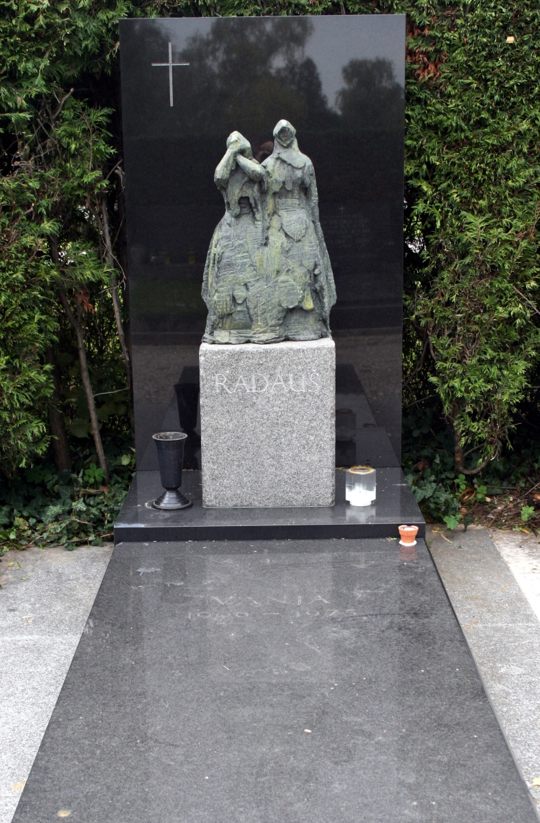 grob Vanje Radauša na Mirogoju u Zagrebu